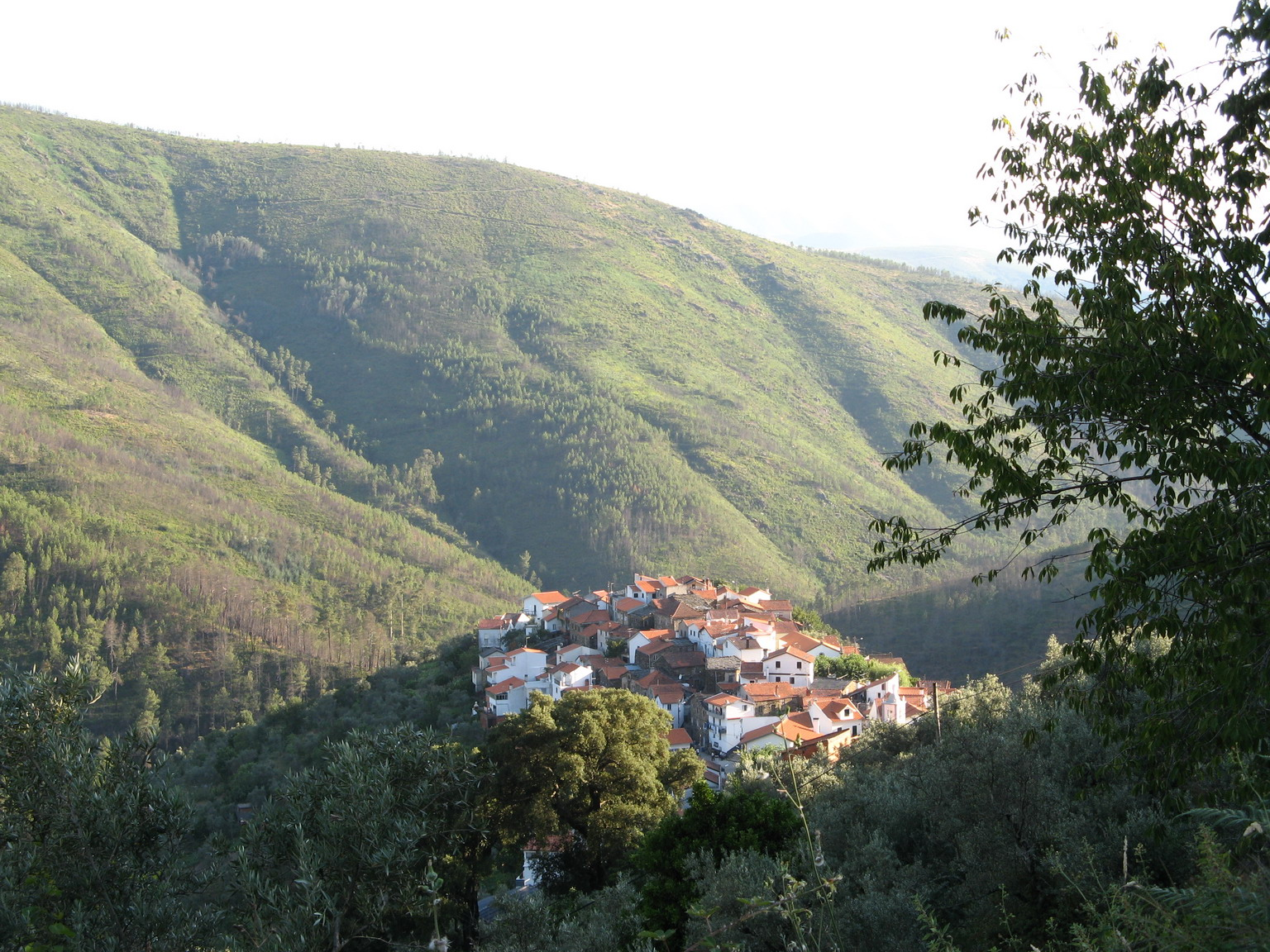 Foto parcial da aldeia da Cabeça (Parque Natural da Serra da Estrela)